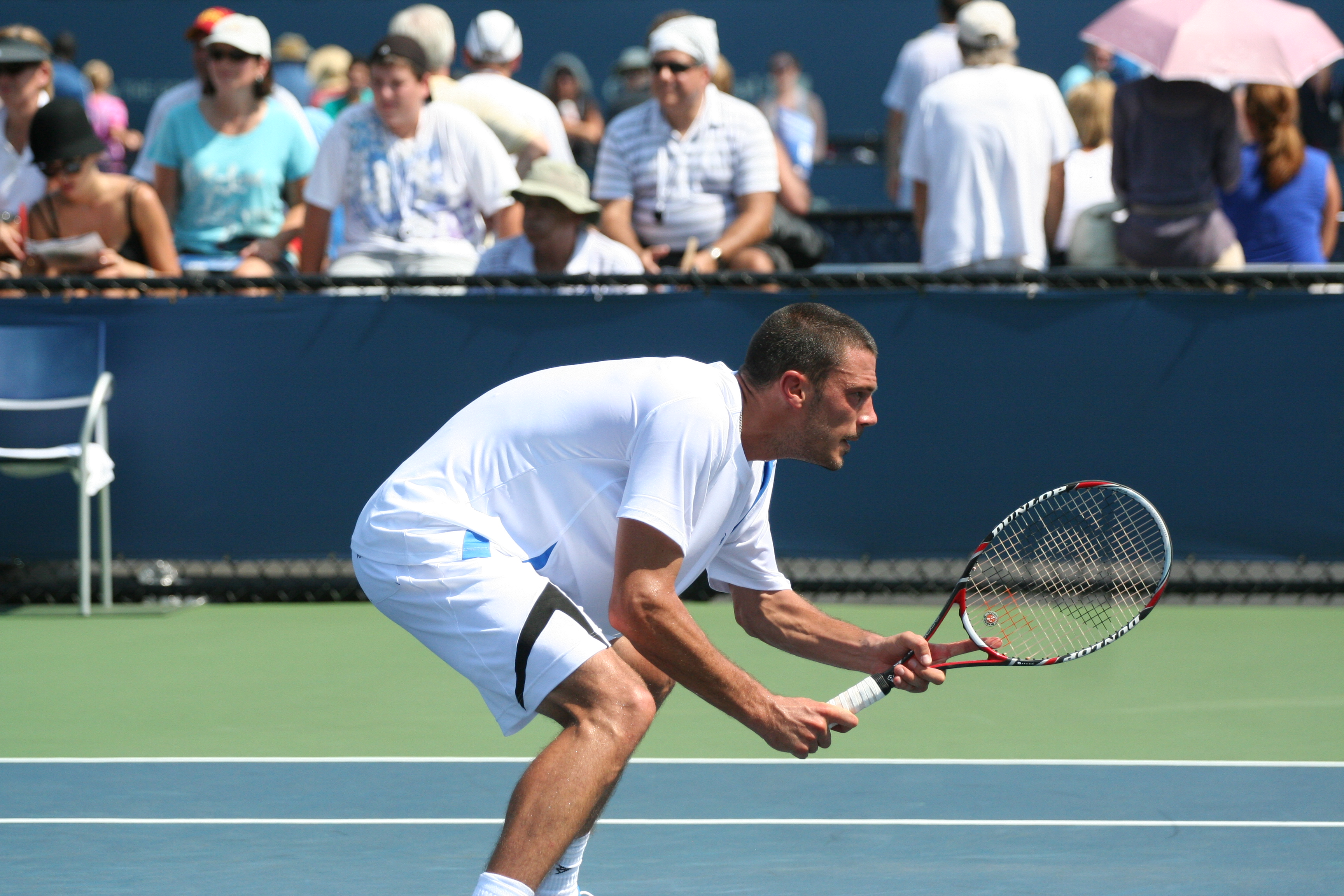 U.S. Open Sept. 2, 2010